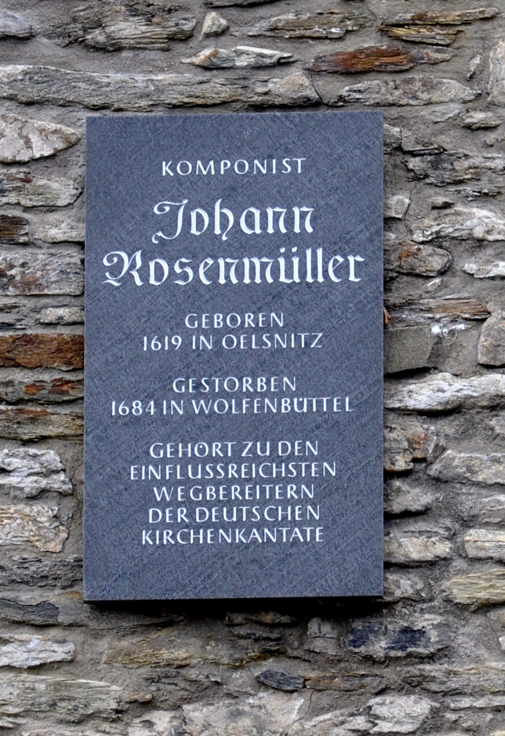 Oelsnitz/Vogtland, Gedenktafel Johann Rosenmüller (am Aufgang zur St.-Jakobikirche)